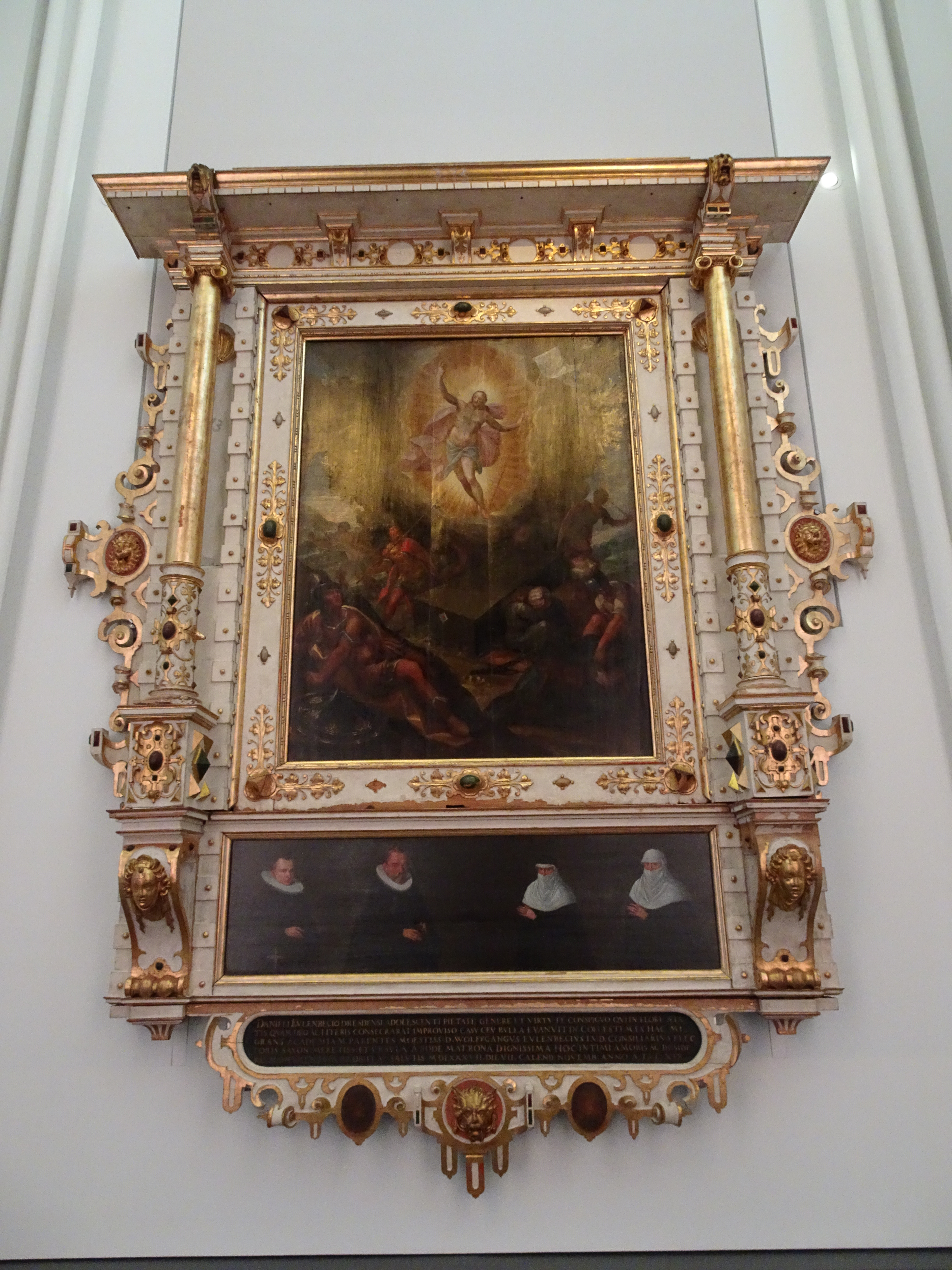 Epitaph für Daniel Eulenbeck in der Leipziger Universitätskirche